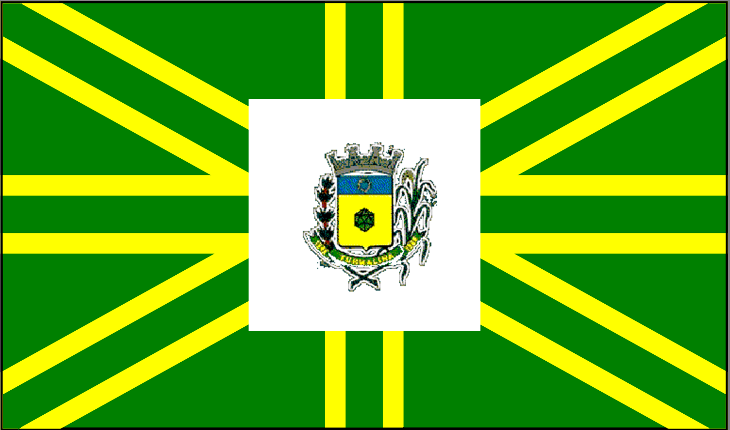 Bandeira_do_Município_de_Turmalina